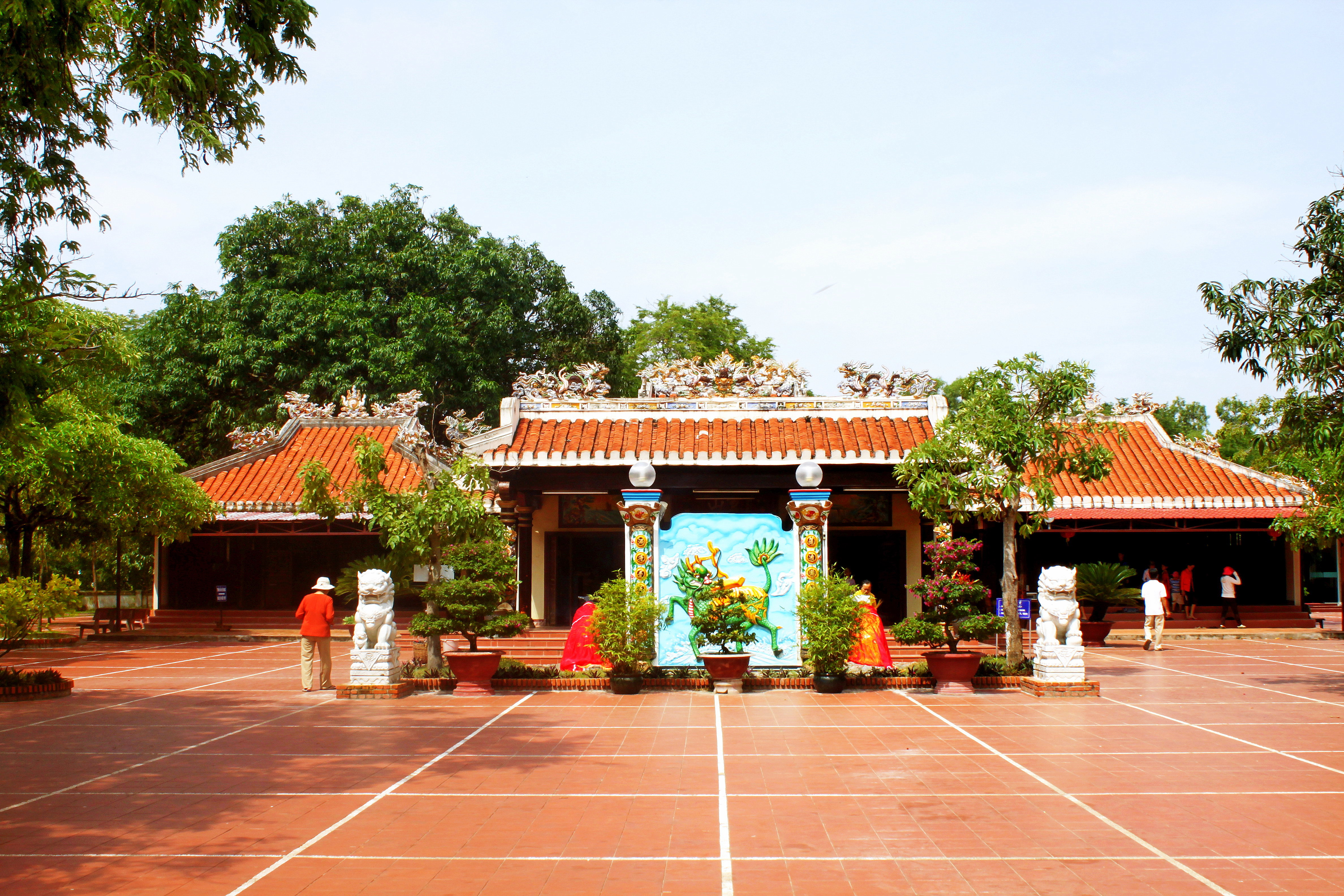 Dinh Thầy Thím tọa lạc tại xã Tân Hải, thị xã La Gi, tỉnh Bình Thuận, Việt Nam. Giữa ảnh là chánh điện, trái ảnh là nhà thờ Hậu hiền, phải ảnh là nhà thờ Tiền hiền.